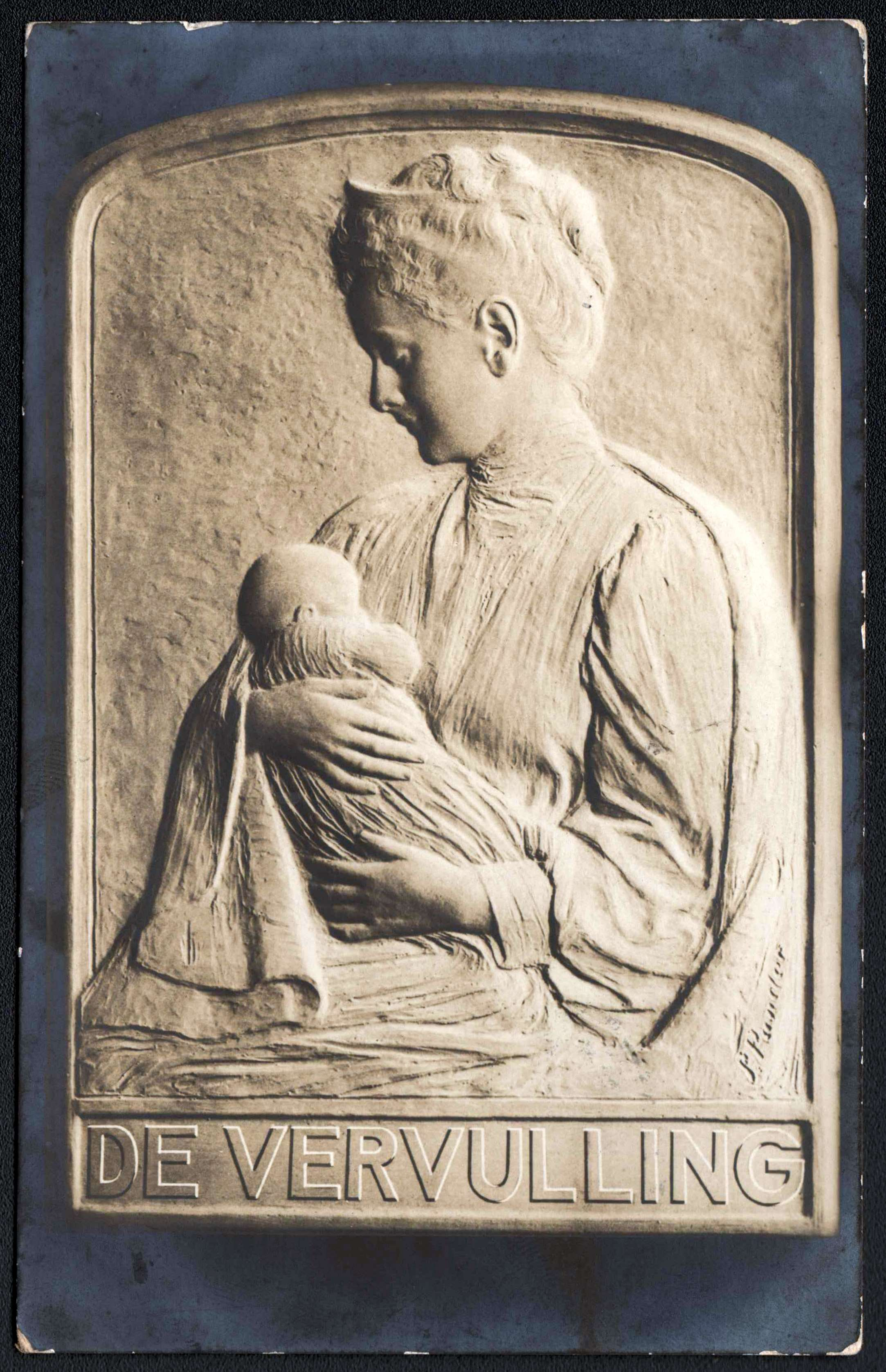 De Vervulling. Naar een relief der Koninklijke Zilverfabriek C. J. Begeer, Utrecht. (1909). Geïnspireerd door de geboorte van prinses Juliana (1909)